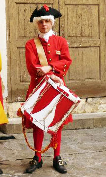 Recreación histórica. Tambor de la Coronela de Barcelona 1713-1714. «Associació de Recreació Històrica la Coronela de Barcelona»